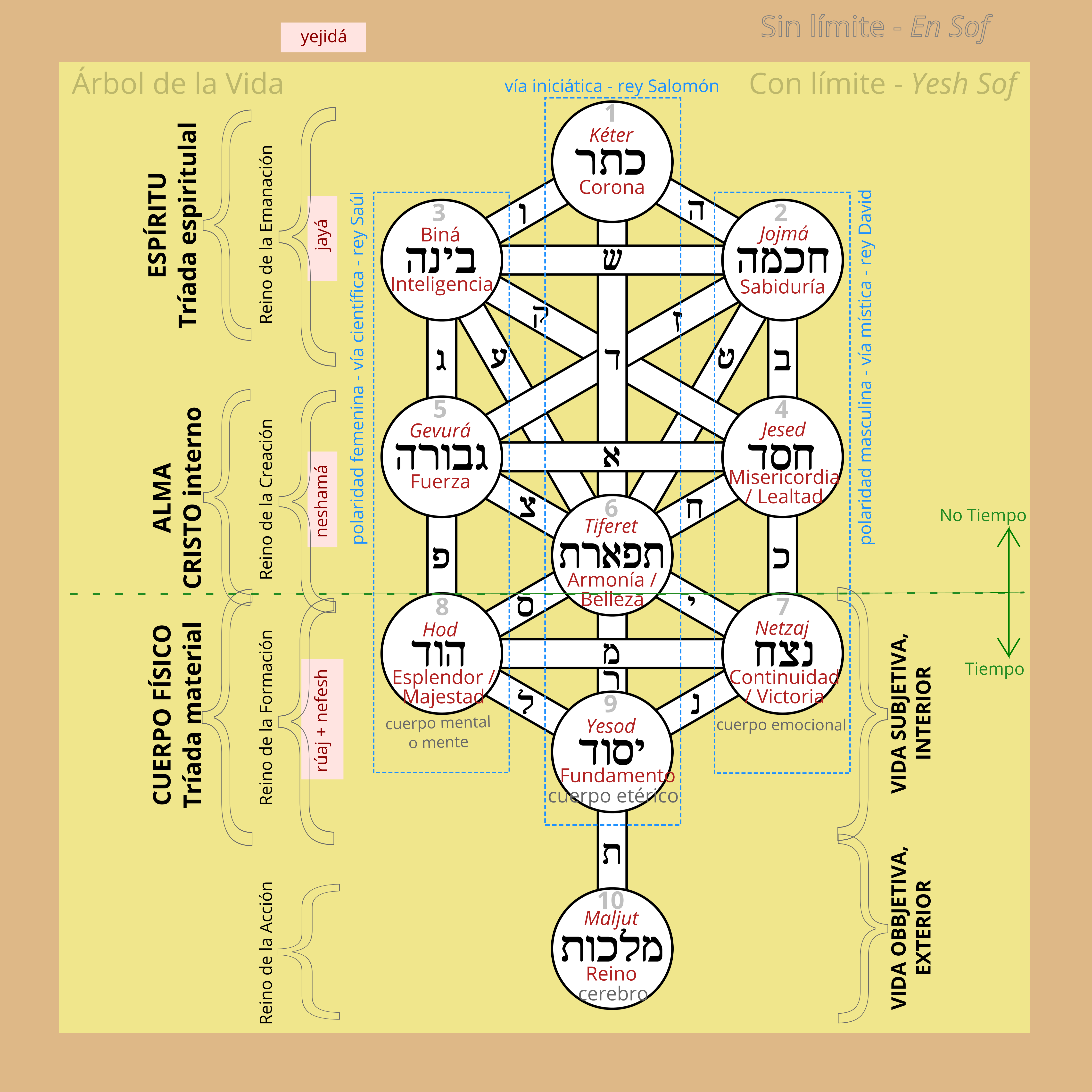 Las 10 sefiras y los 22 caminos (o senderos) que componen el árbol sefirótico. Este es el esquema que corresponde a nuestra cadena. Los esquemas que muestran tres senderos que parten desde Maljut corresponden a la cadena anterior y no estás actualizados en relación a nuestra humanidad actual.